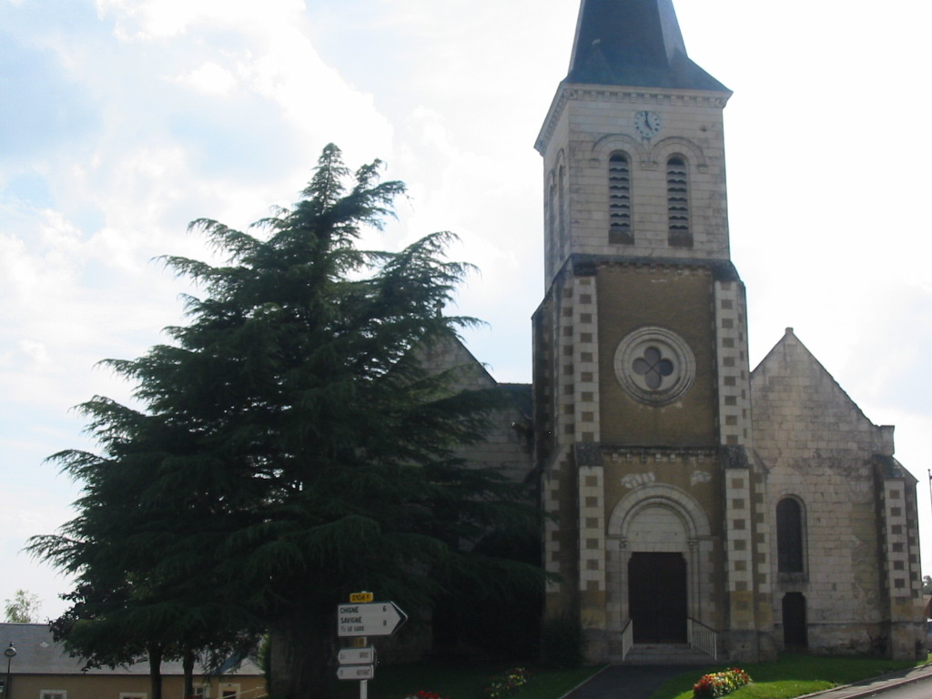 Dissé vue de l'Église